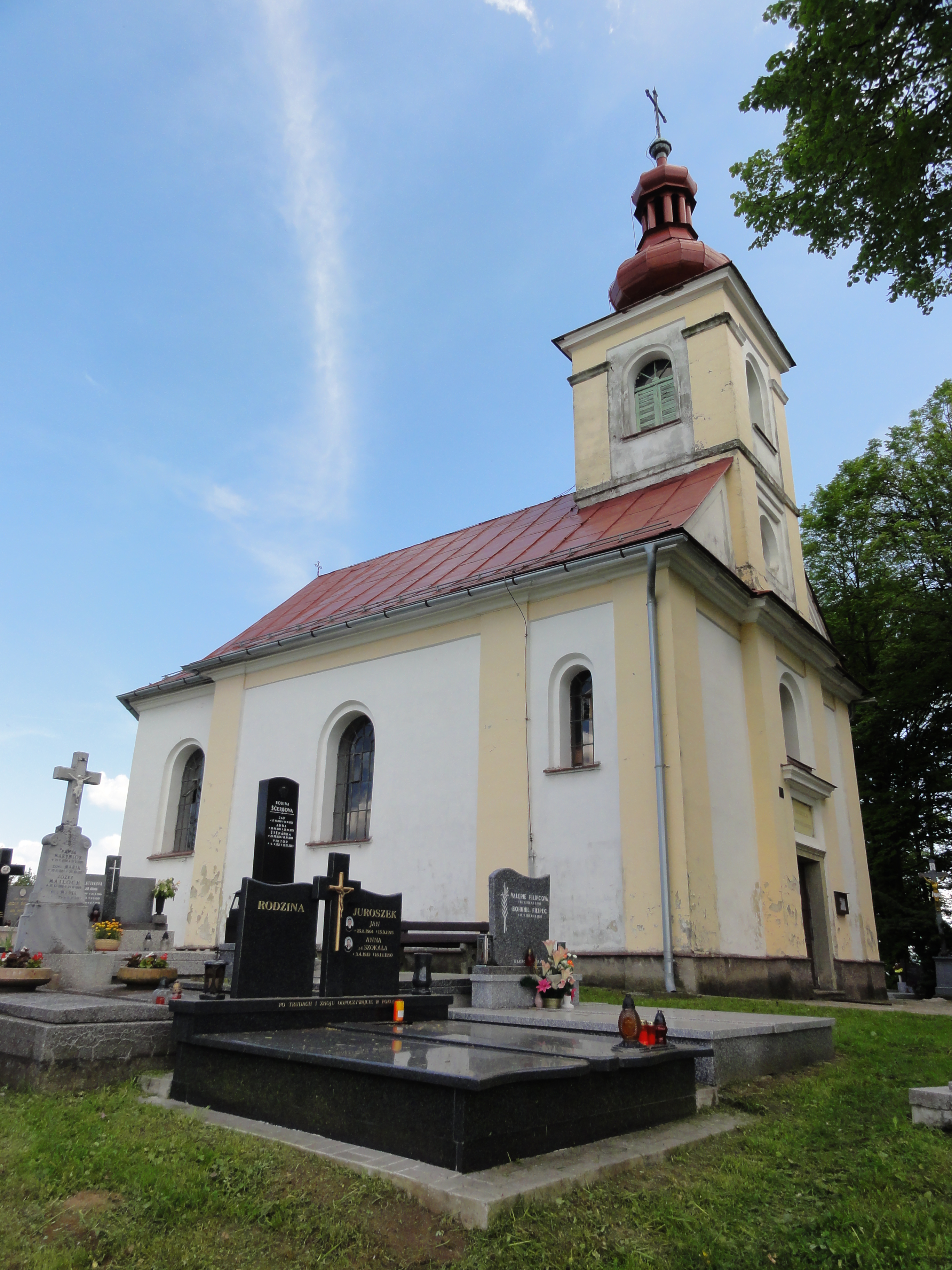 Czeski Cieszyn, Koniaków, kościółek katolicki